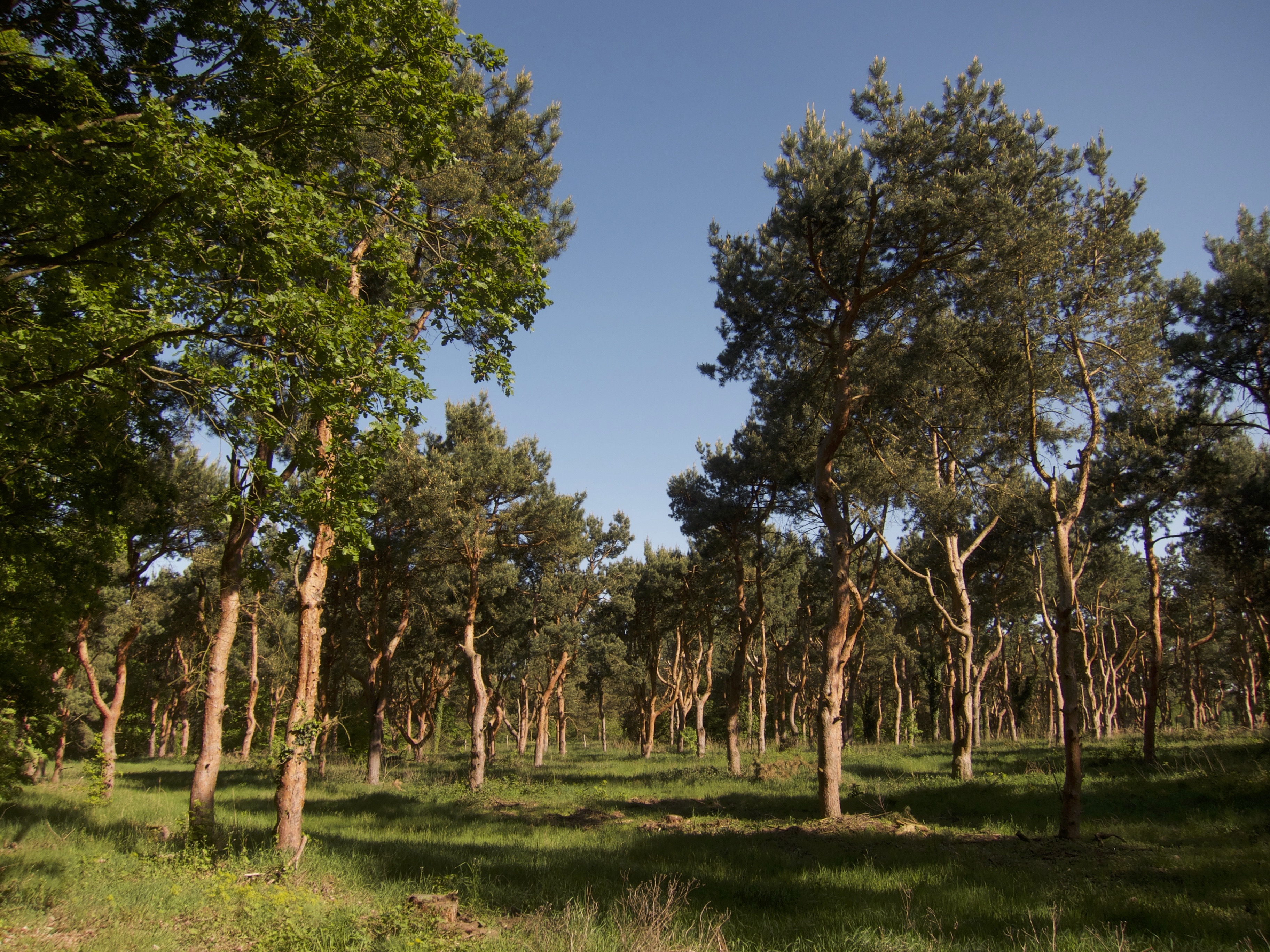 Baumbestand in Lehniner Mittelheide am Gohlitzsee.